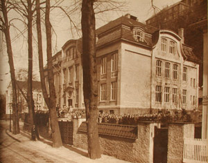 Bilde av BHG fra gamle dager, skal brukes for å illustrere hvordan skolen så ut før i tiden.